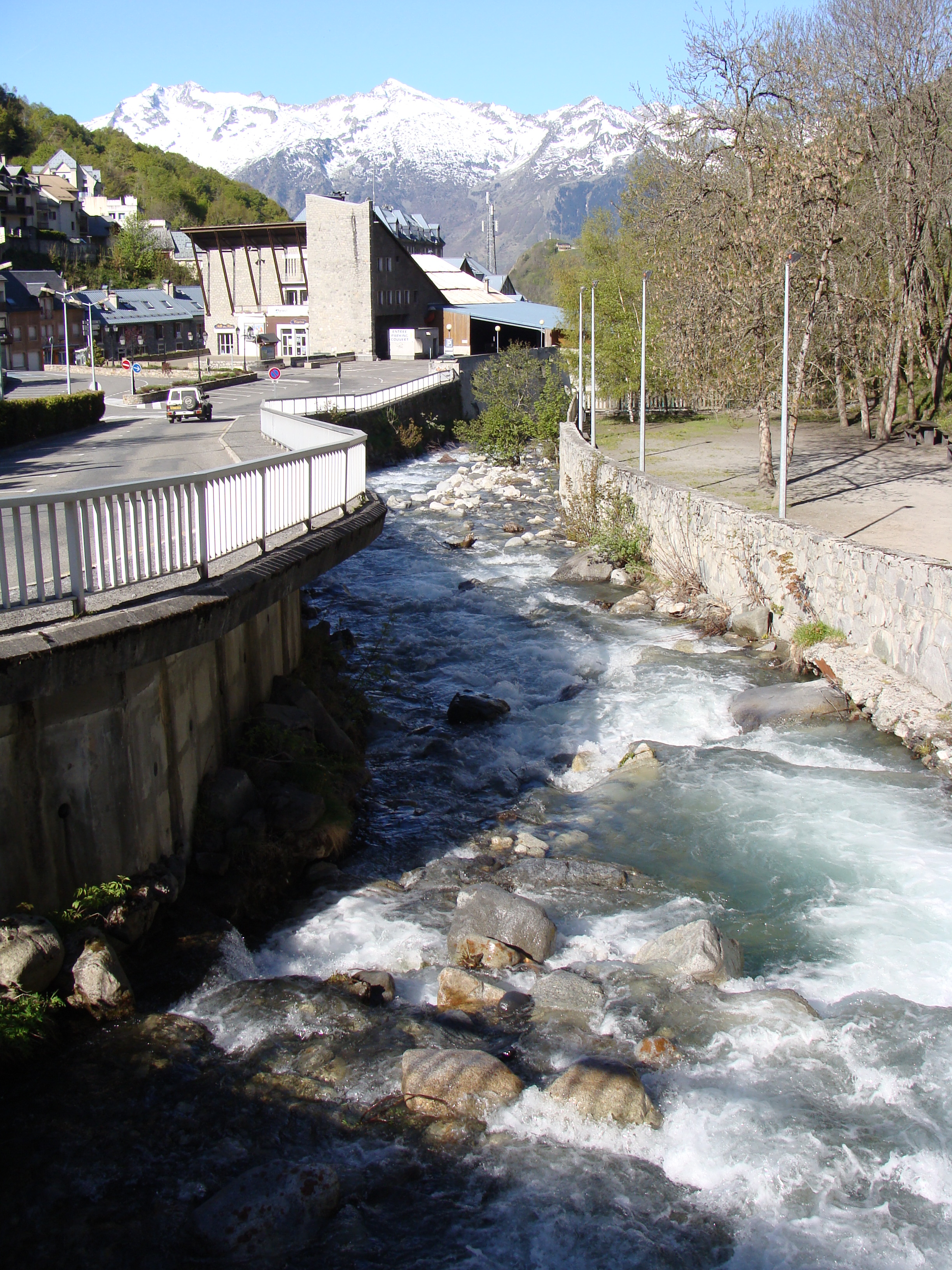 Barèges - Salle des Fêtes et le bastan